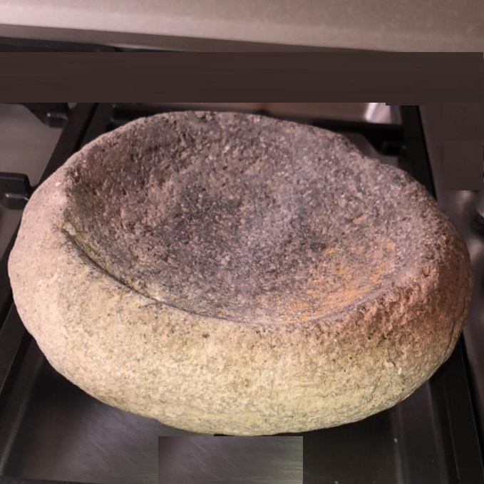 Molcaxitl o molcajete (mortero) prehispánico encontrado en Tezoacoalco, Oaxaca, México.